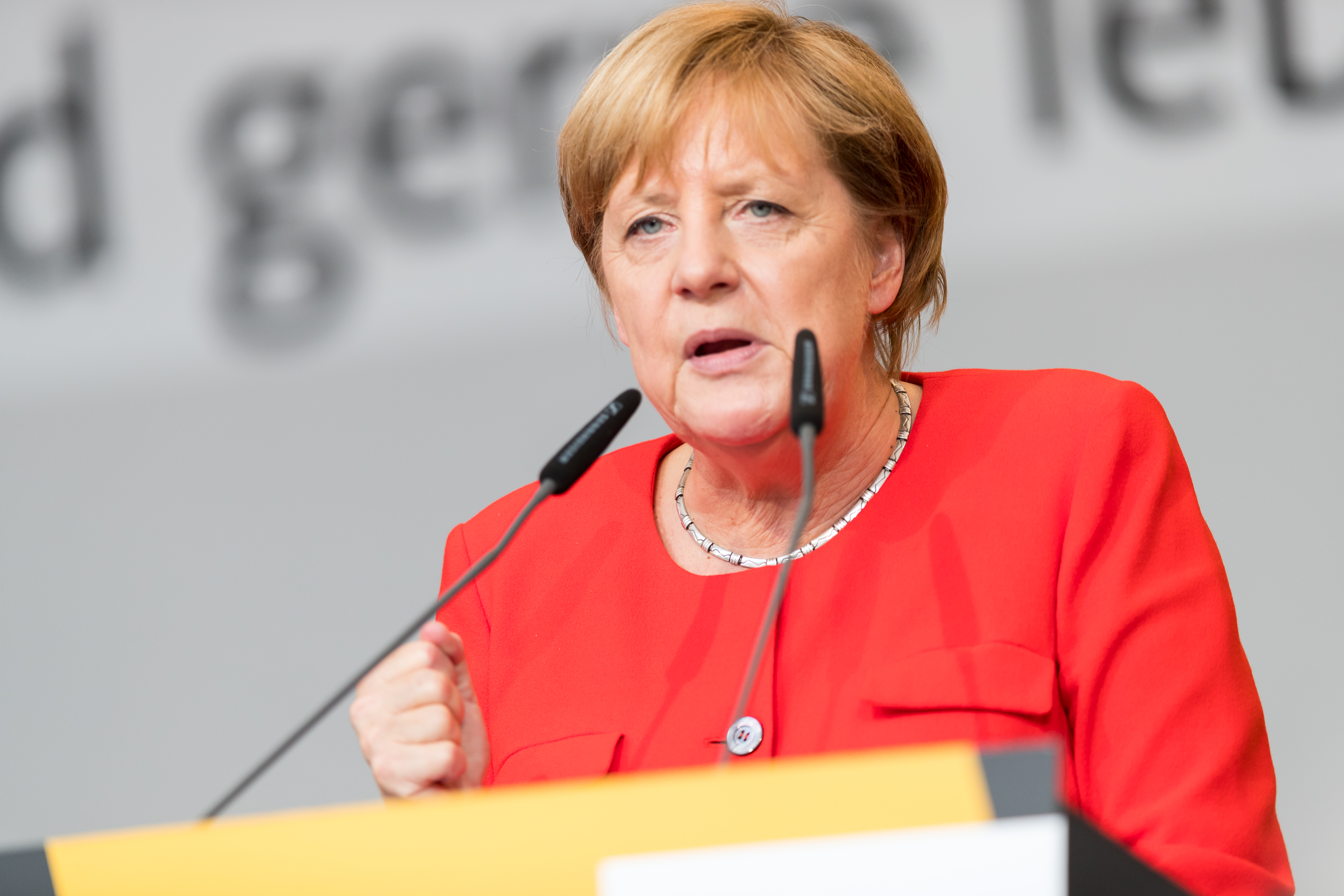 Angela Merkel during CDU Wahlkampf Heidelberg at Universitätsplatz Heidelberg, Heidelberg, Baden-Württemberg, Germany on 2017-09-05, Photo: Sven Mandel Claudia von Brauchitsch Karl Alfred Lamers Thomas Strobl